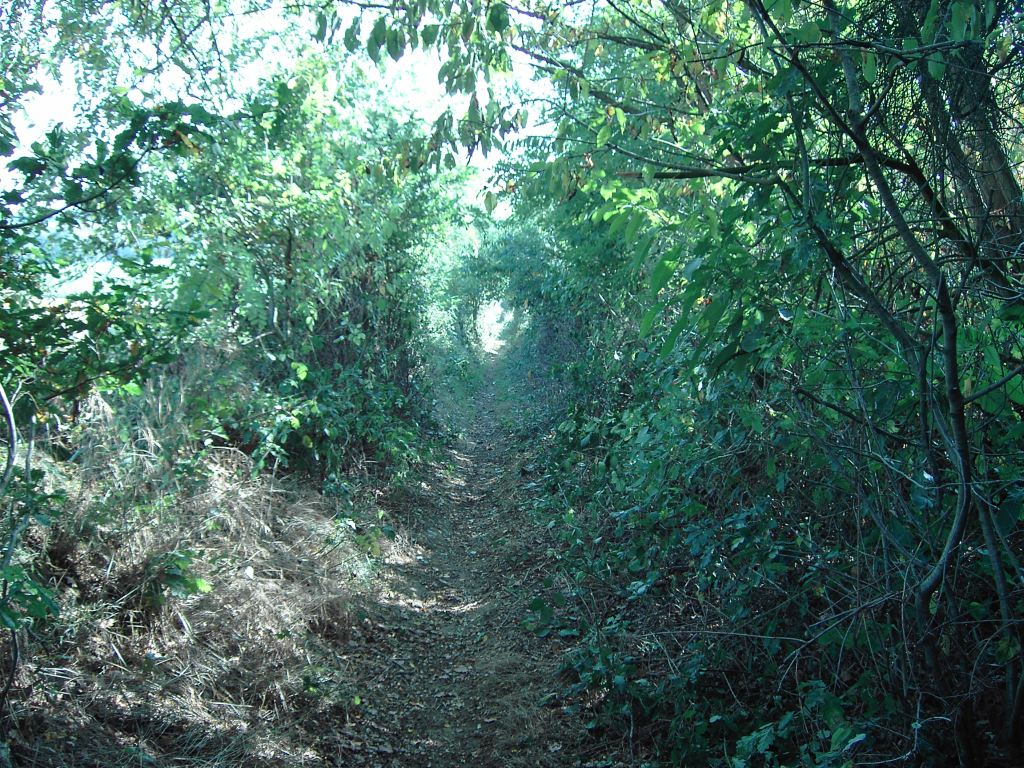 Typische veldweg in Linden